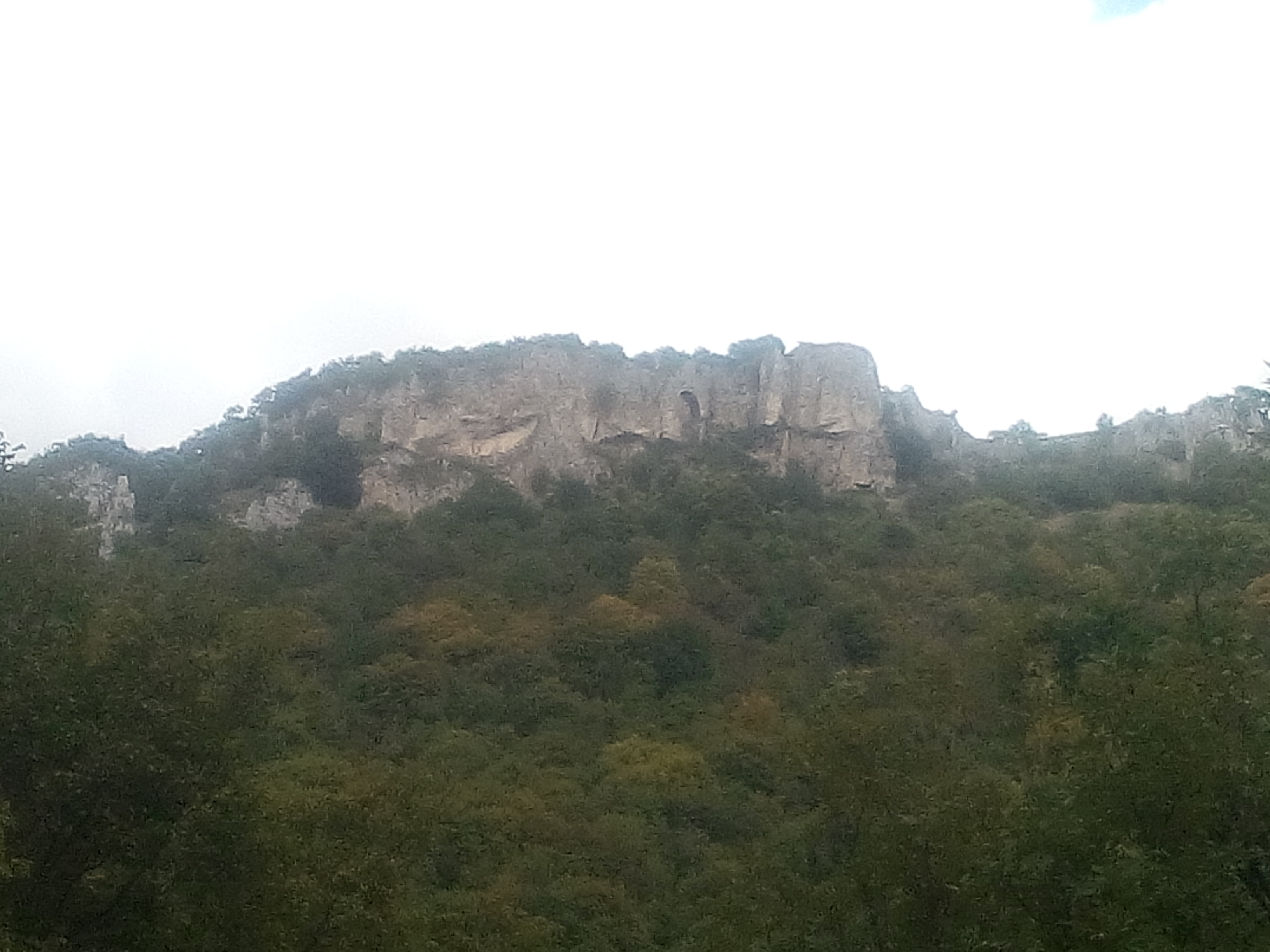 Camerata Vecchia, Lazio